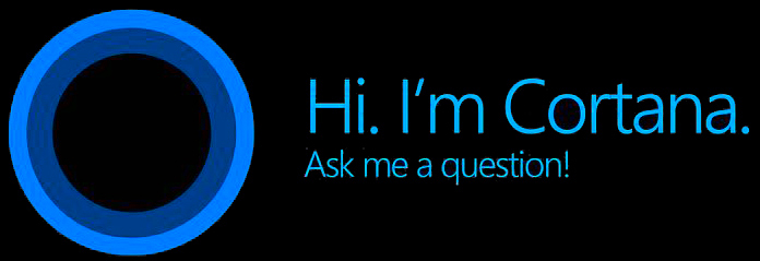 Cortana By Microsoft